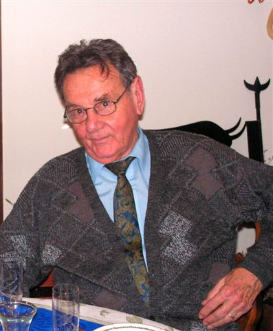 Georges Gros (1922-2018) à Noël 2004